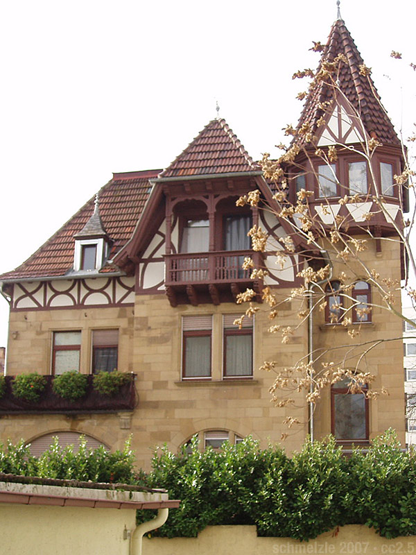 Historisches Wohnhaus Wilhelmstr.42 in Heilbronn.